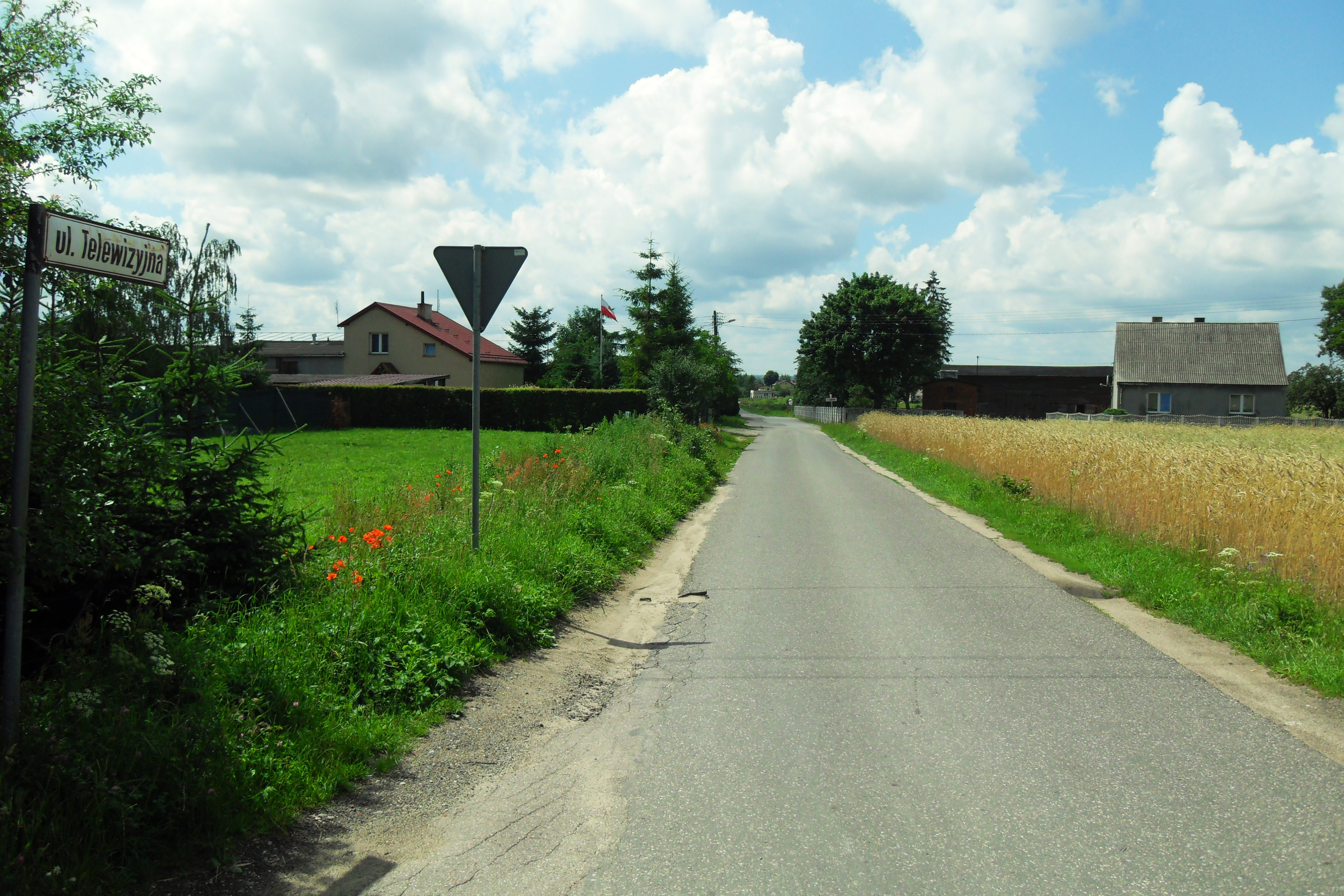 Gdańsk Klukowo. Ul. Telewizyjna, skrzyżowanie z ul. Radarową.